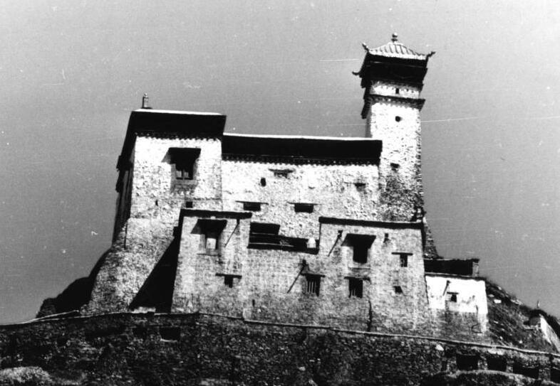 Ombulakhang